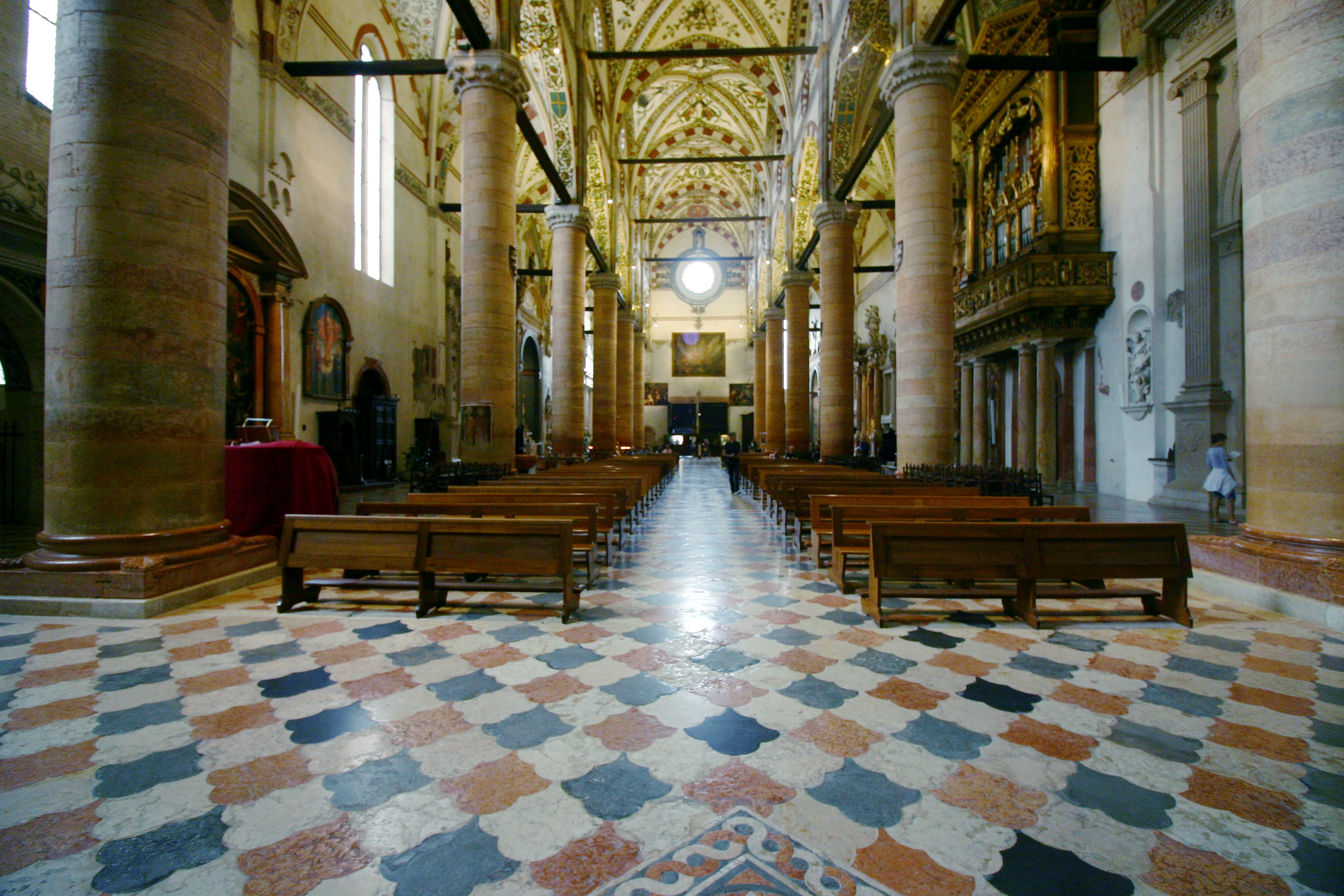 Sant'Anastasia - Verona